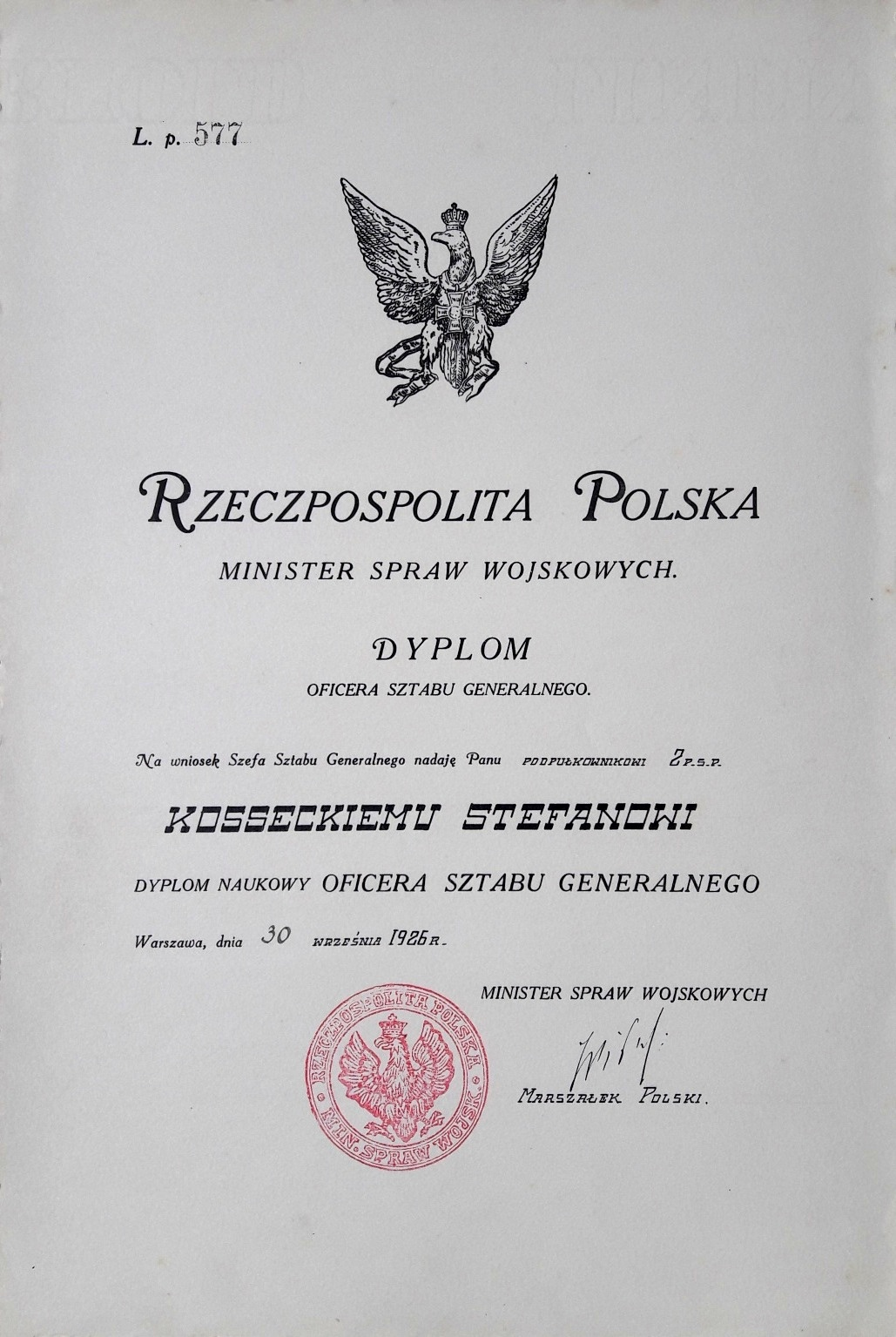 Dyplom oficera Sztabu Generalnego nadany ppłk Stefanowi Kosseckiemu 30 września 1926 r. Podpisano: Minister Spraw Wojskowych J.Piłsudski, Marszalek Polski